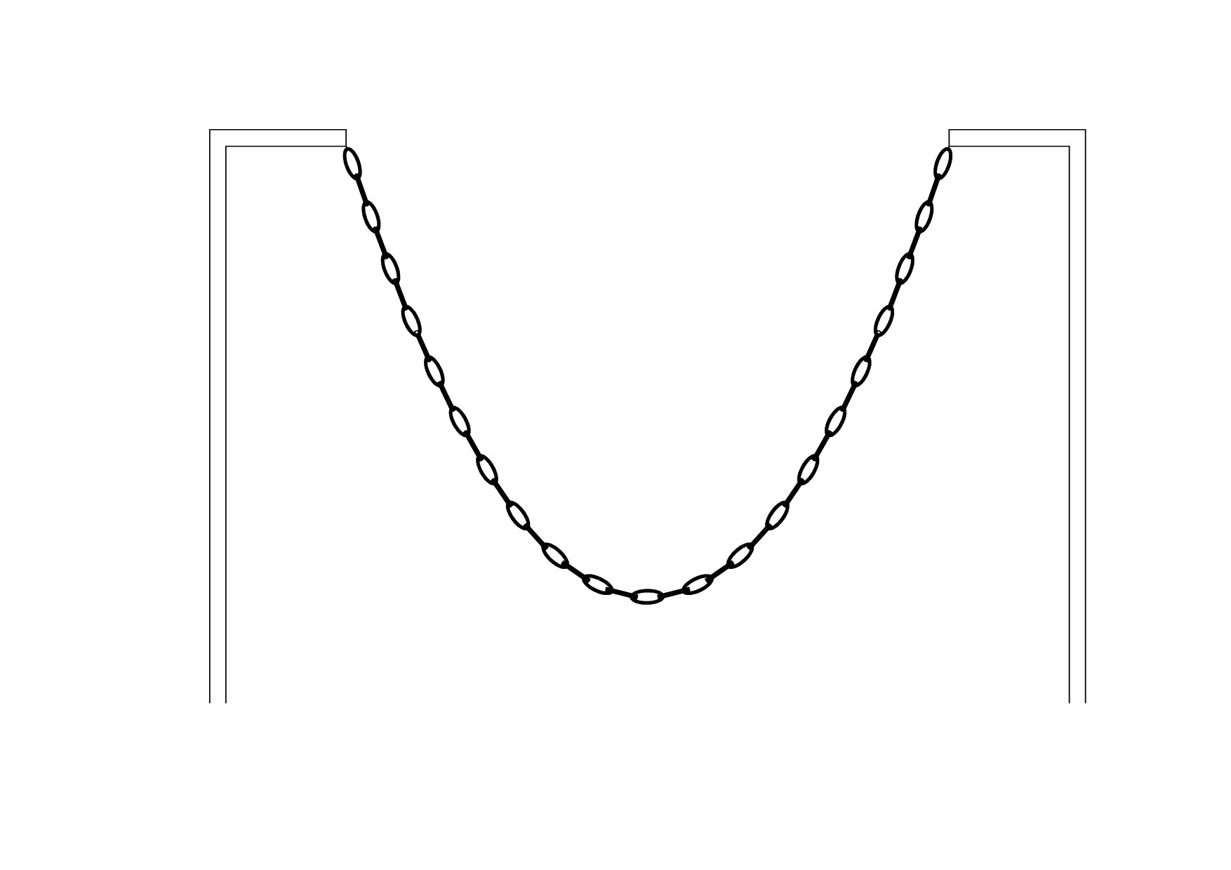 Die Kettenlinie (Katenoide) ist der Graph der Funktion f(x)=cosh(x) oder f(x)=(12)(ex+e-x). Man spricht cosh als Cosinus Hyperbolicus. Der Name Kettenlinie rührt daher, dass eine Kette diese Form annimmt, wenn man sie an zwei Punkten aufhängt.